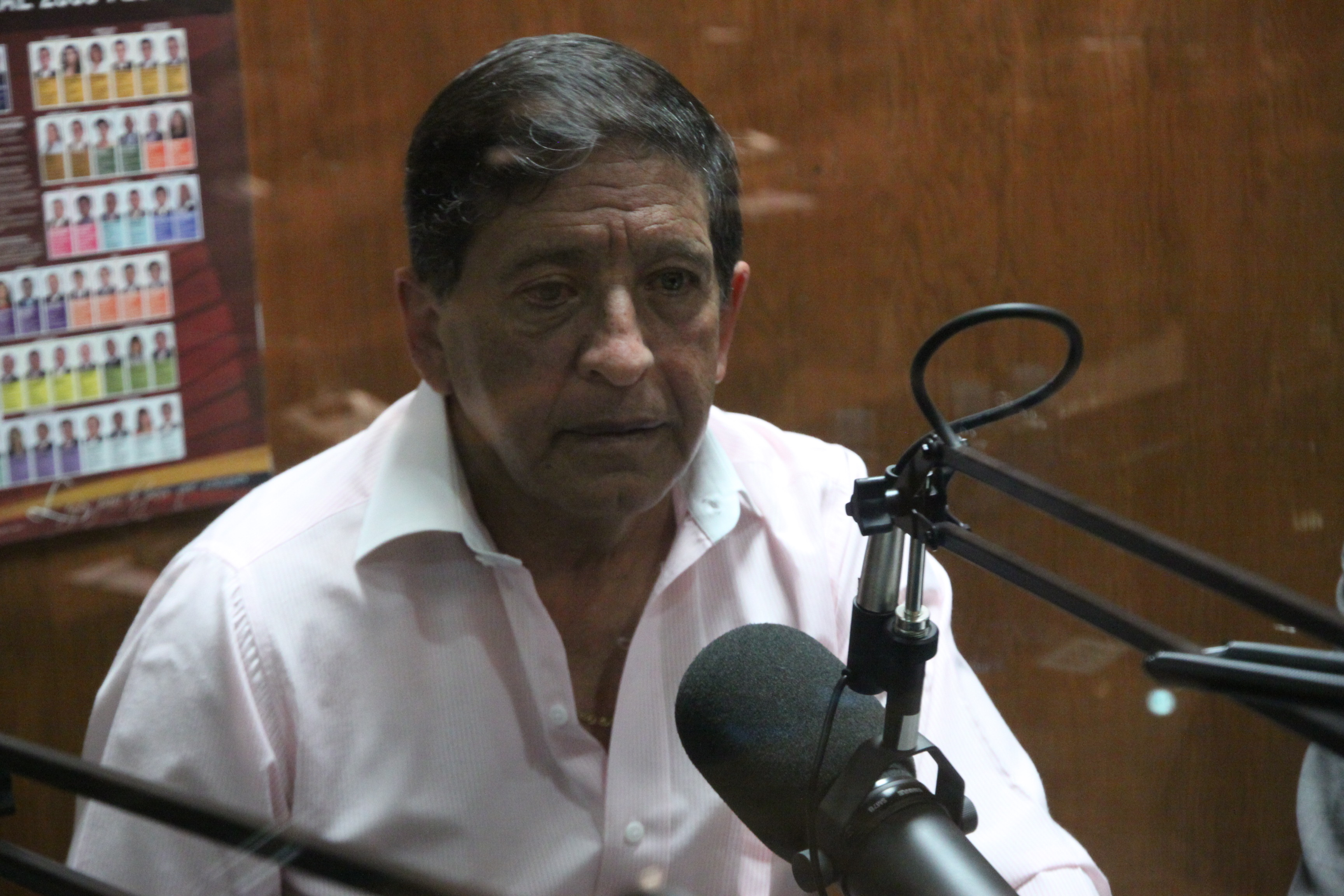 Foto: Hugo Ortiz Ron / Asamblea Nacional